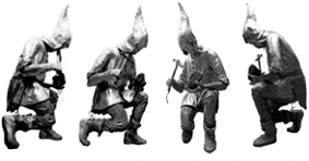 Bergknappendenkmal am Kristberg im Silbertal / Montafon